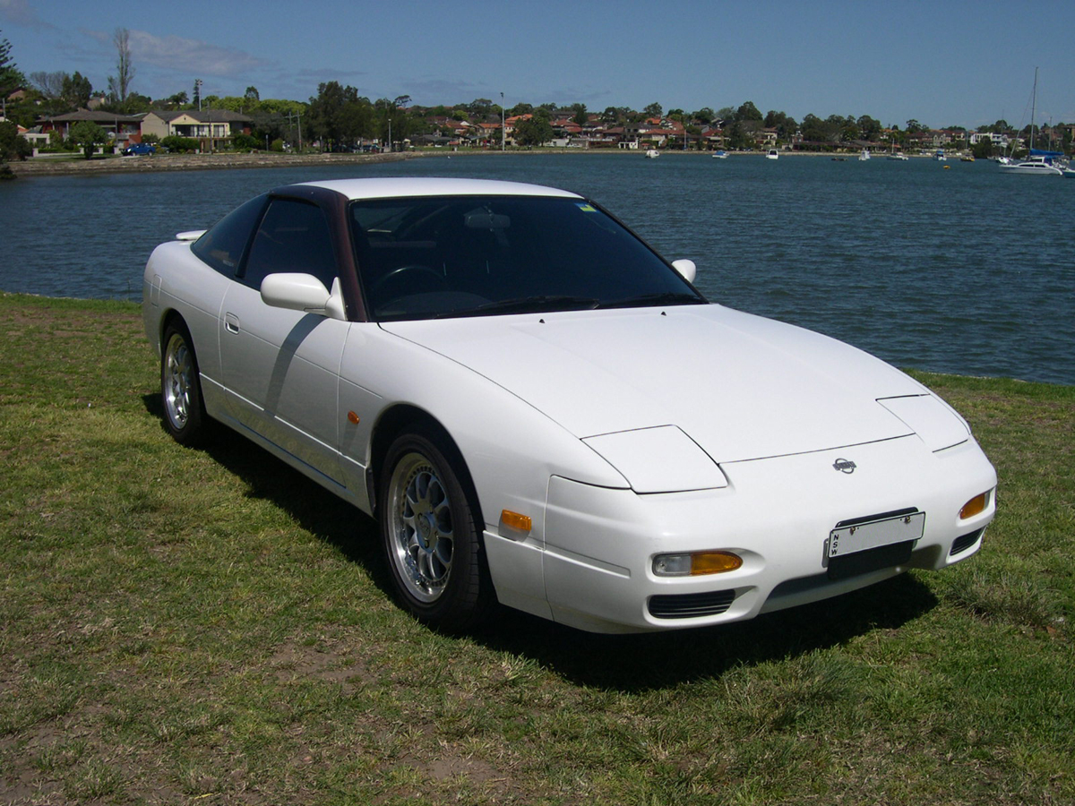 Nissan 180SX (1995 model)